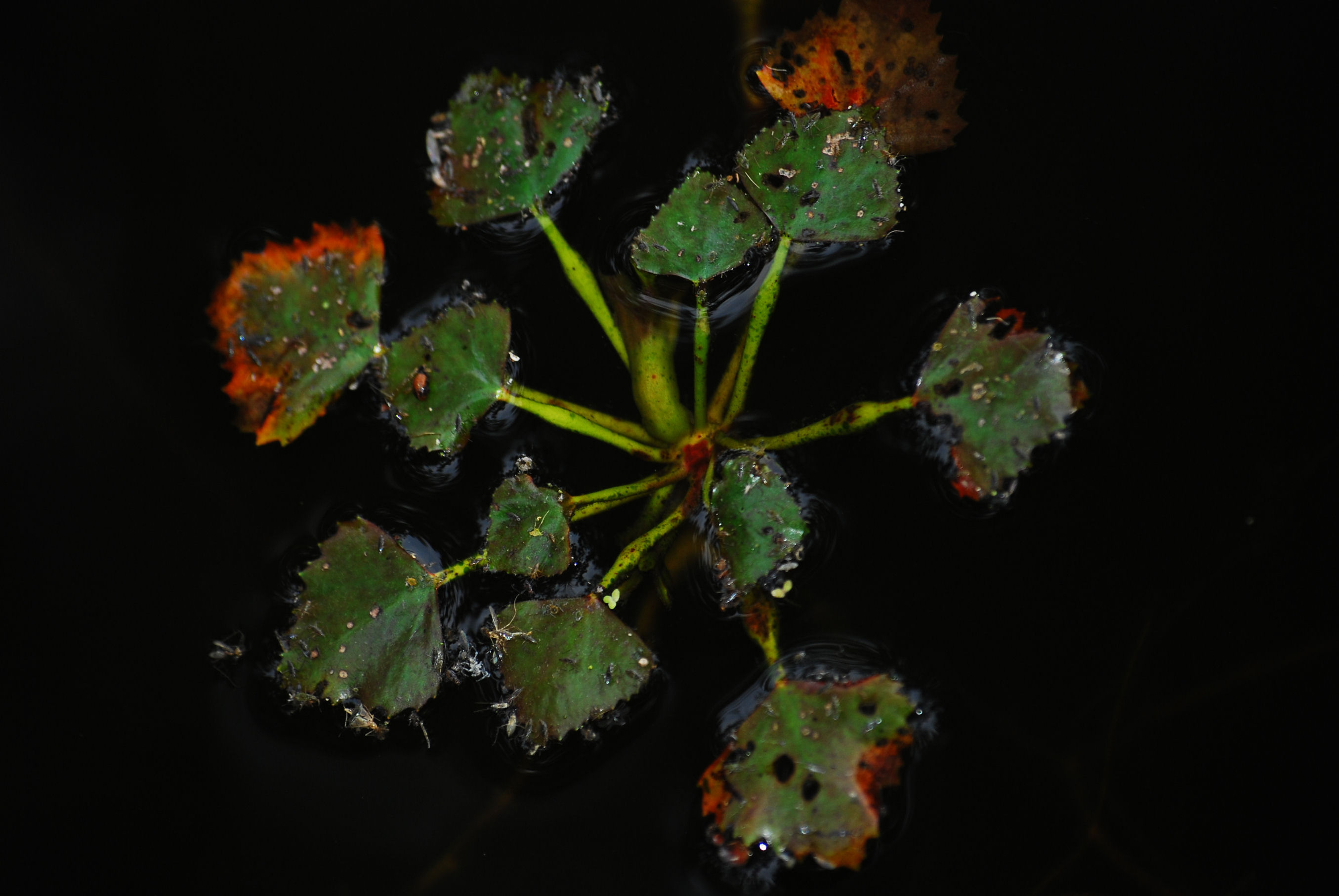 Trapa natans (Kotewka)w rezerwacie przyrody Łęźczok w powiecie raciborskim